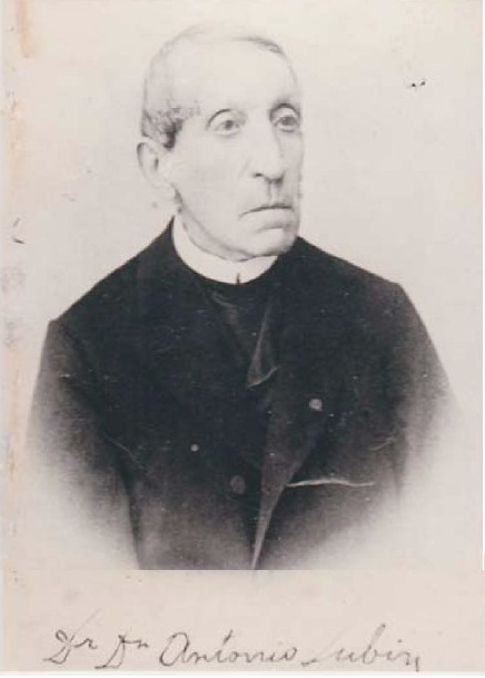 Antonio Lubin (1809 – 1900). Autore ignoto. Fonte: fotocopia di fotografia di mia proprietà. Licenza: immagine di oltre 100 anni fa (il personaggio è morto nel 1900.